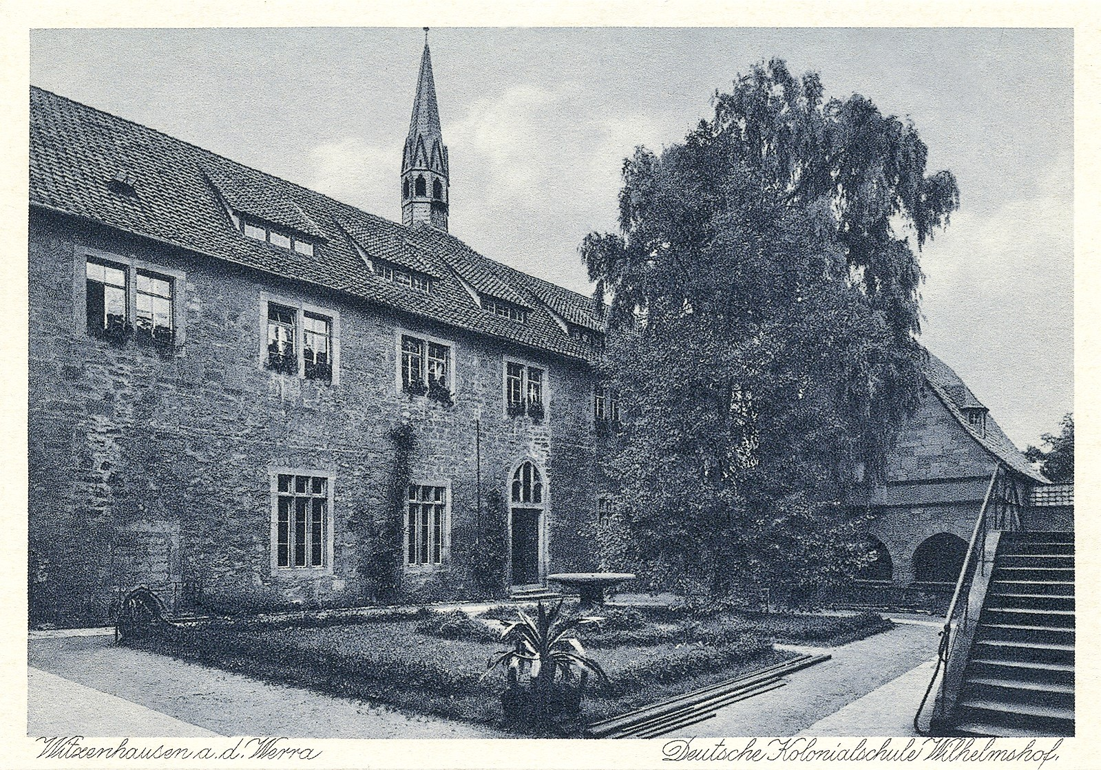 Deutsche Kolonialschule Wihelmshof, Witzenhausen an der Werra, Deutschland.